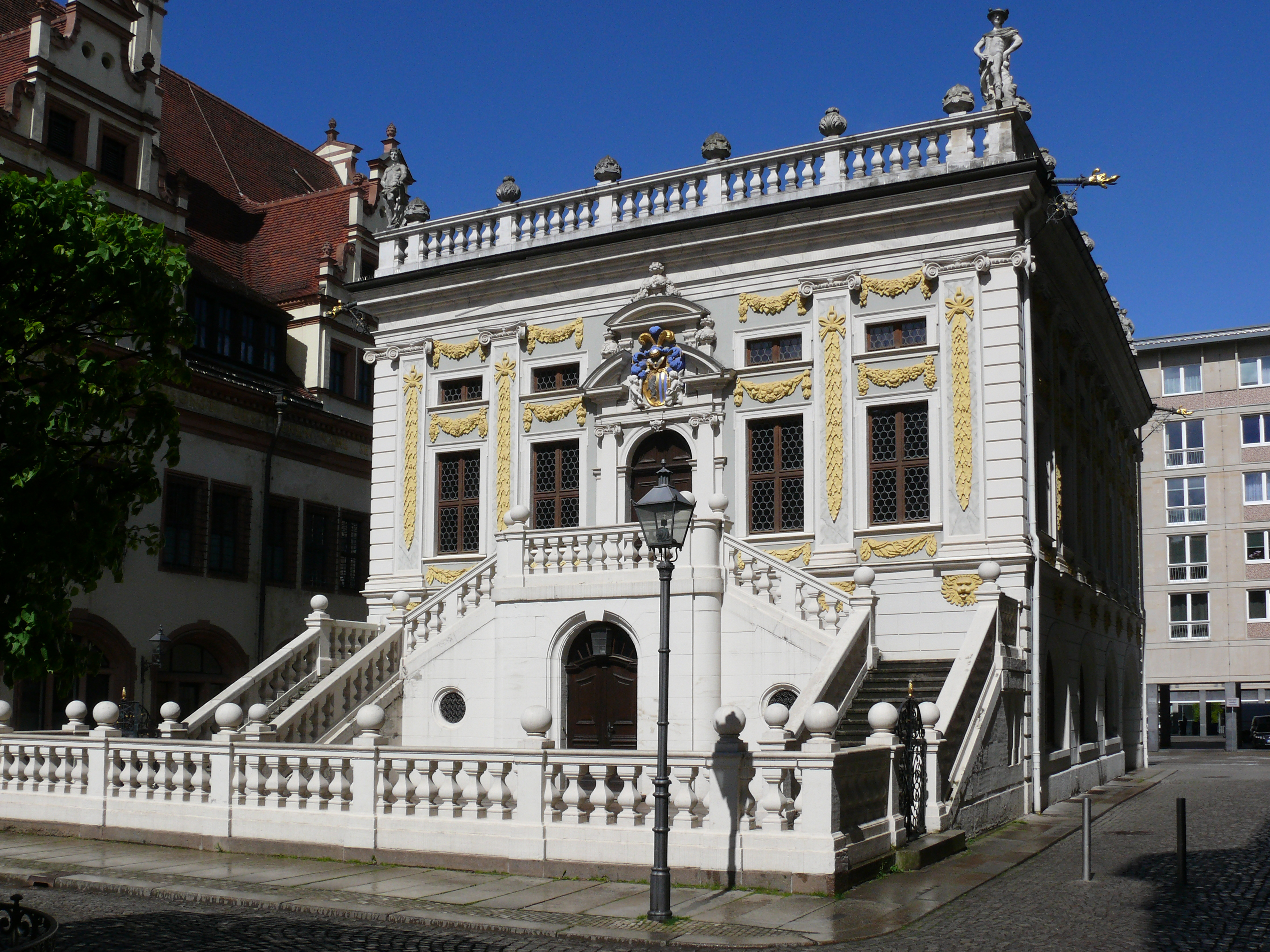 De Alte Handelsbörse op de Naschmarkt in Leipzig.